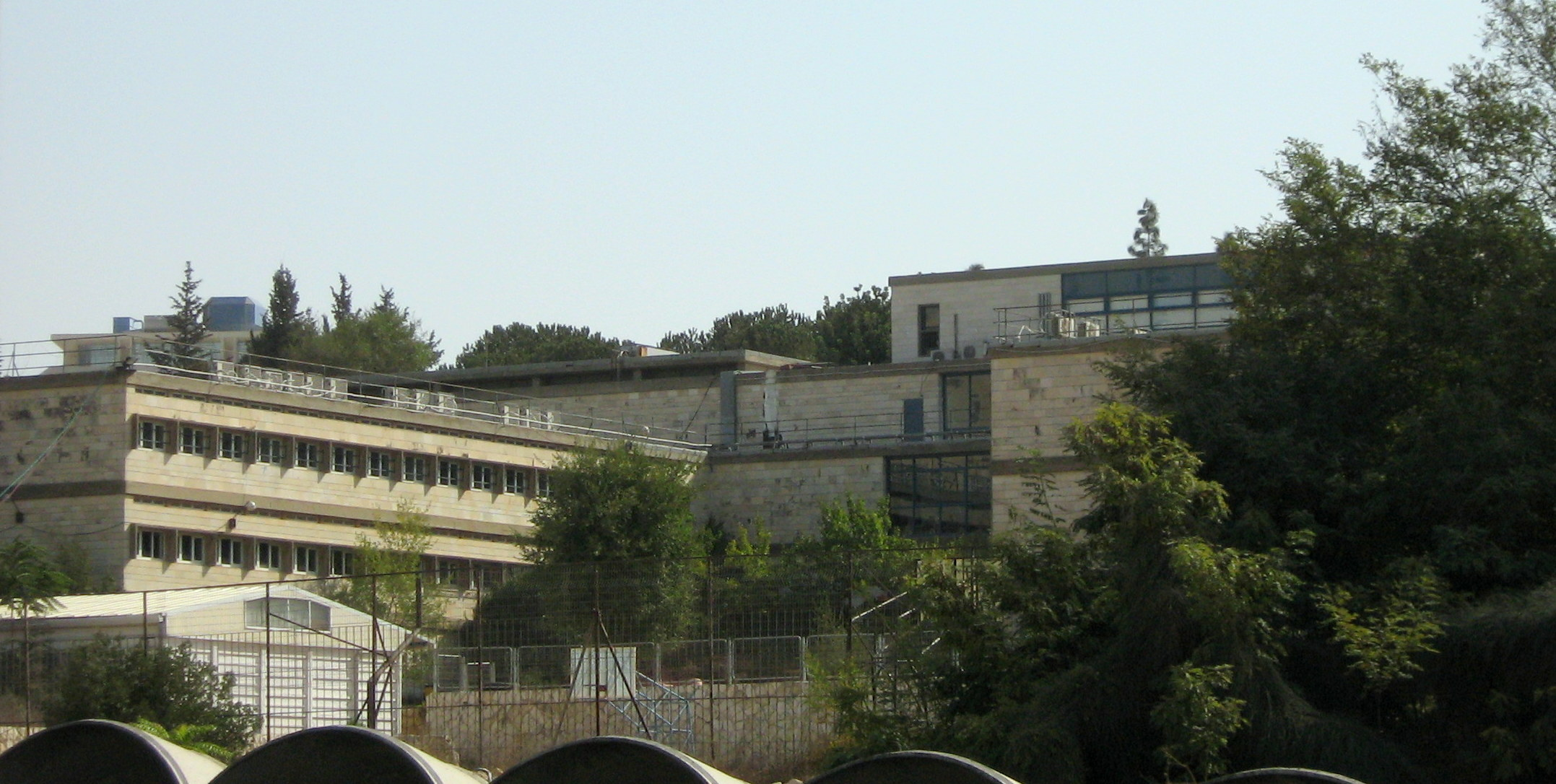 Leyada school back